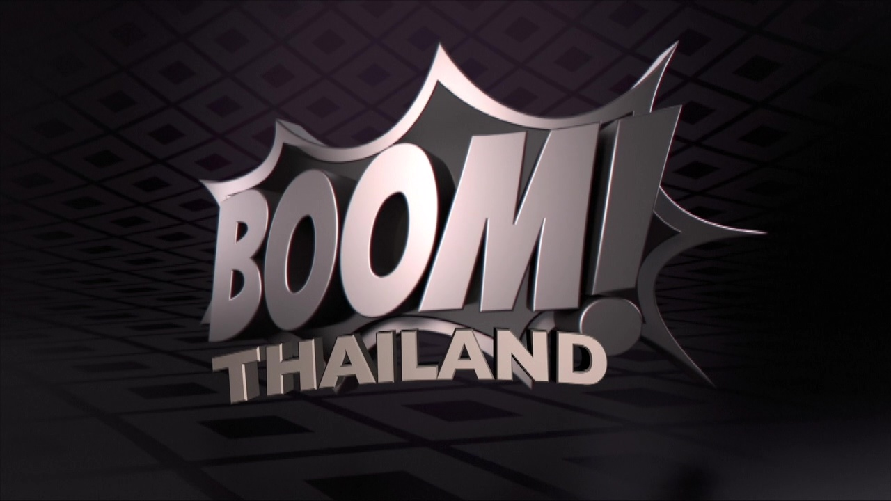 ทำให้ผู้อ่านสามารถระบุและจดจำบทความได้อย่างรวดเร็ว ซึ่งไม่สามารถถ่ายทอดได้ด้วยคำอย่างเดียว